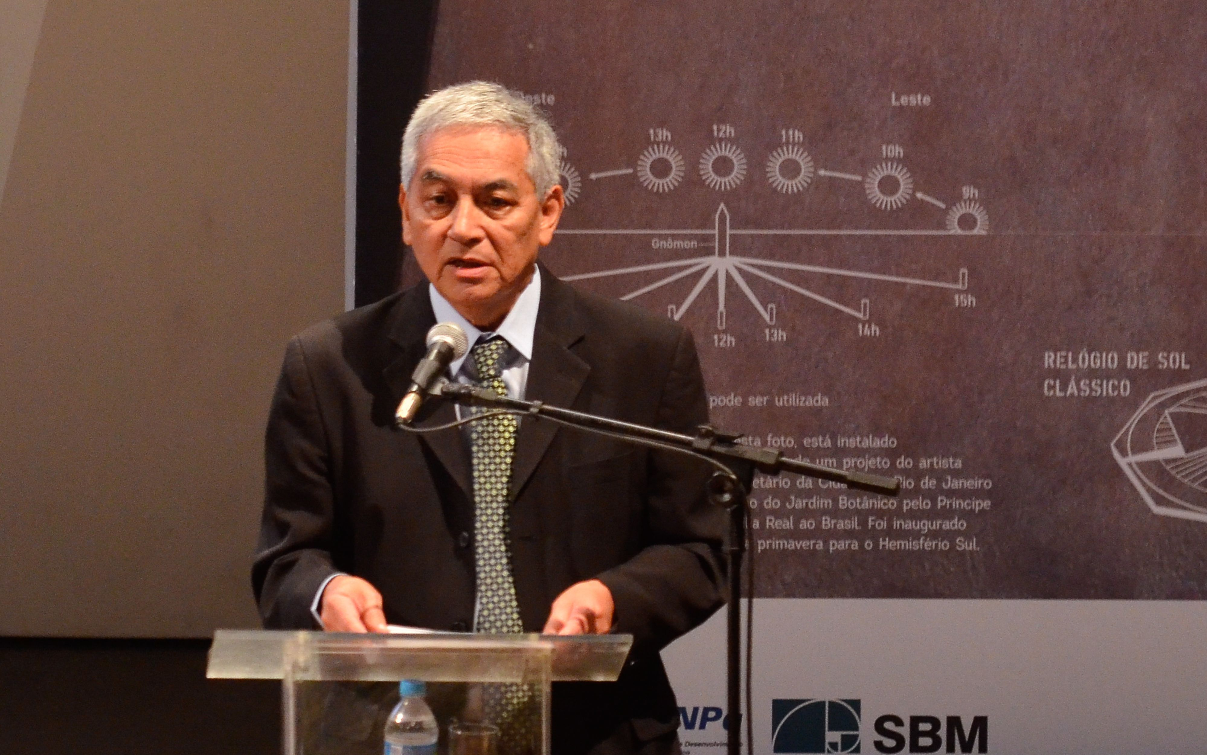 O diretor do Instituto Nacional de Matemática Pura e Aplicada (IMPA), César Camacho, na cerimônia nacional de premiação da 10ª Olimpíada Brasileira de Matemática das Escolas Públicas.